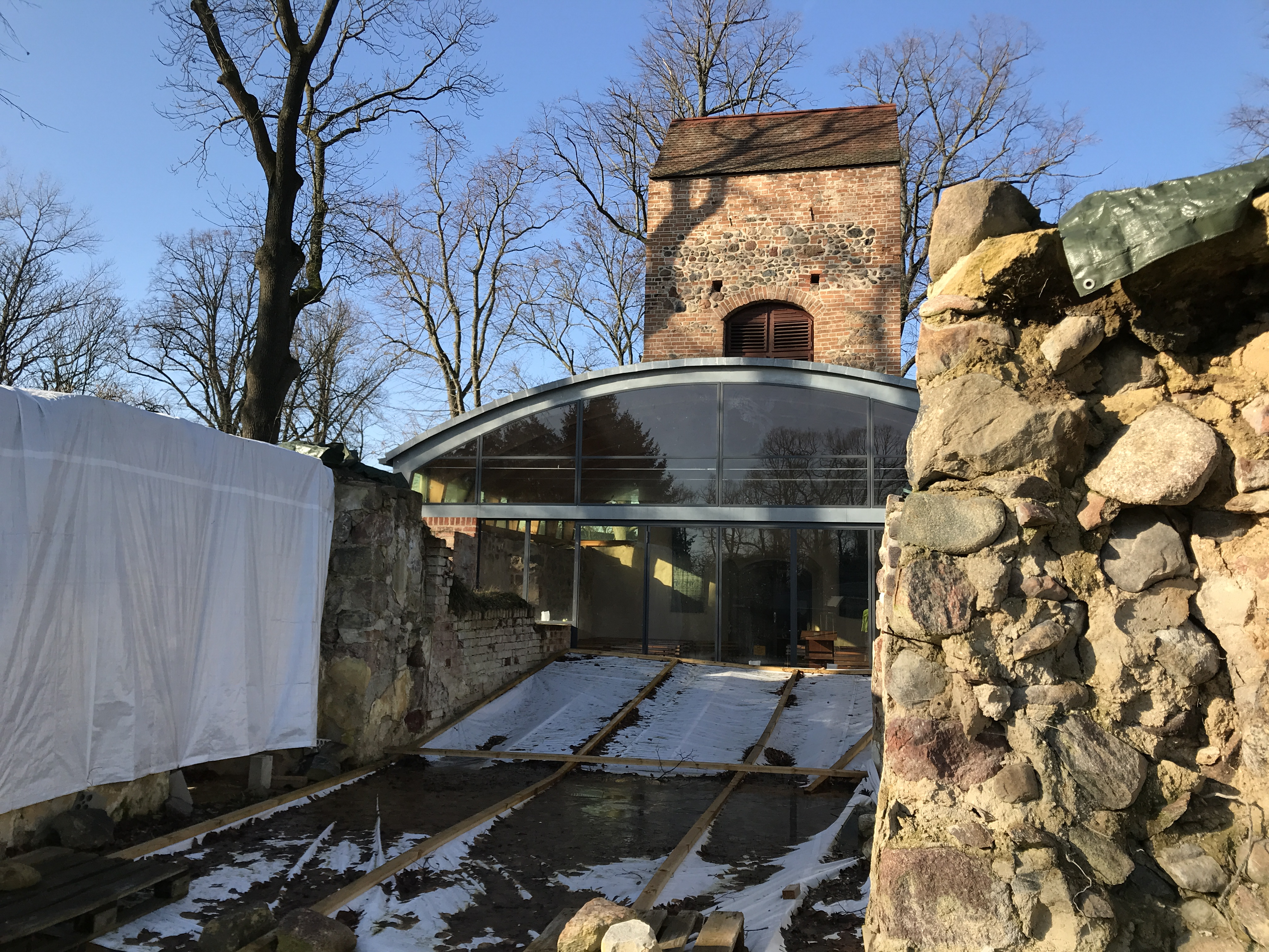 Dorfkirche Heinsdorf, spätromanische Kirche in Niebendorf-Heinsdorf in Brandenburg. Das Bauwerk wurde 1970 teilweise abgetragen.